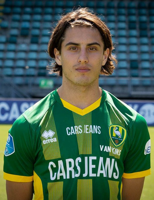 Mats van Kins